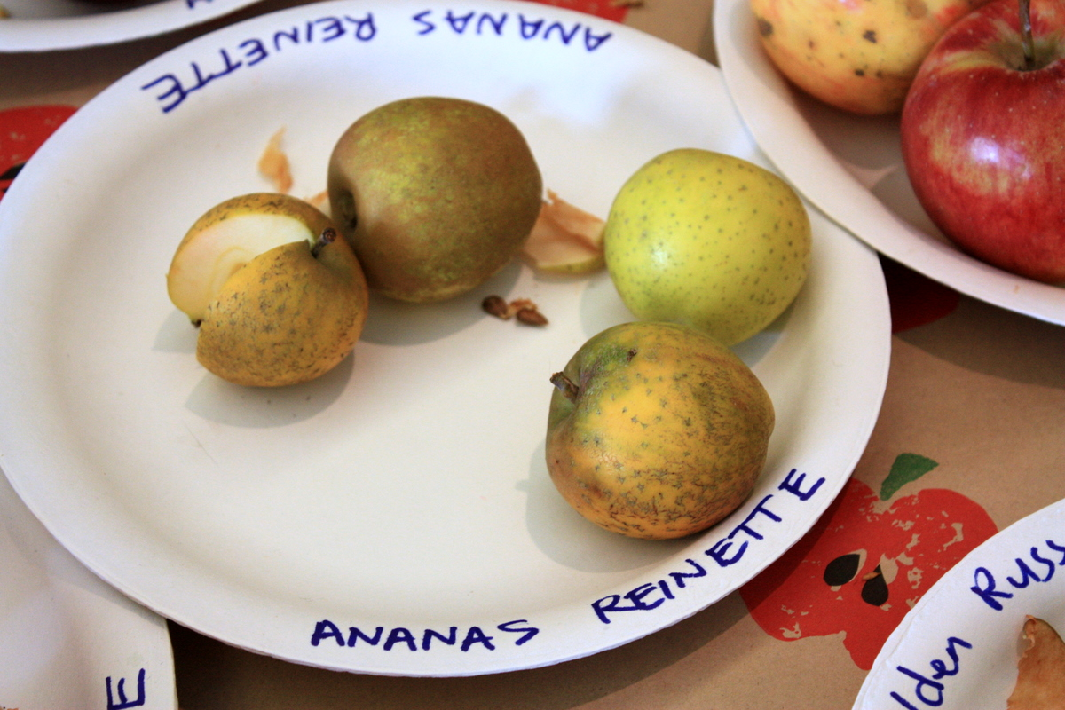 Ananas Reinette